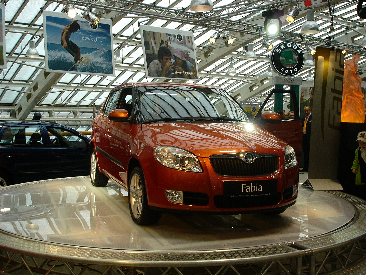 Skoda Fabia 2007 auf dem Linzer Autofrühling